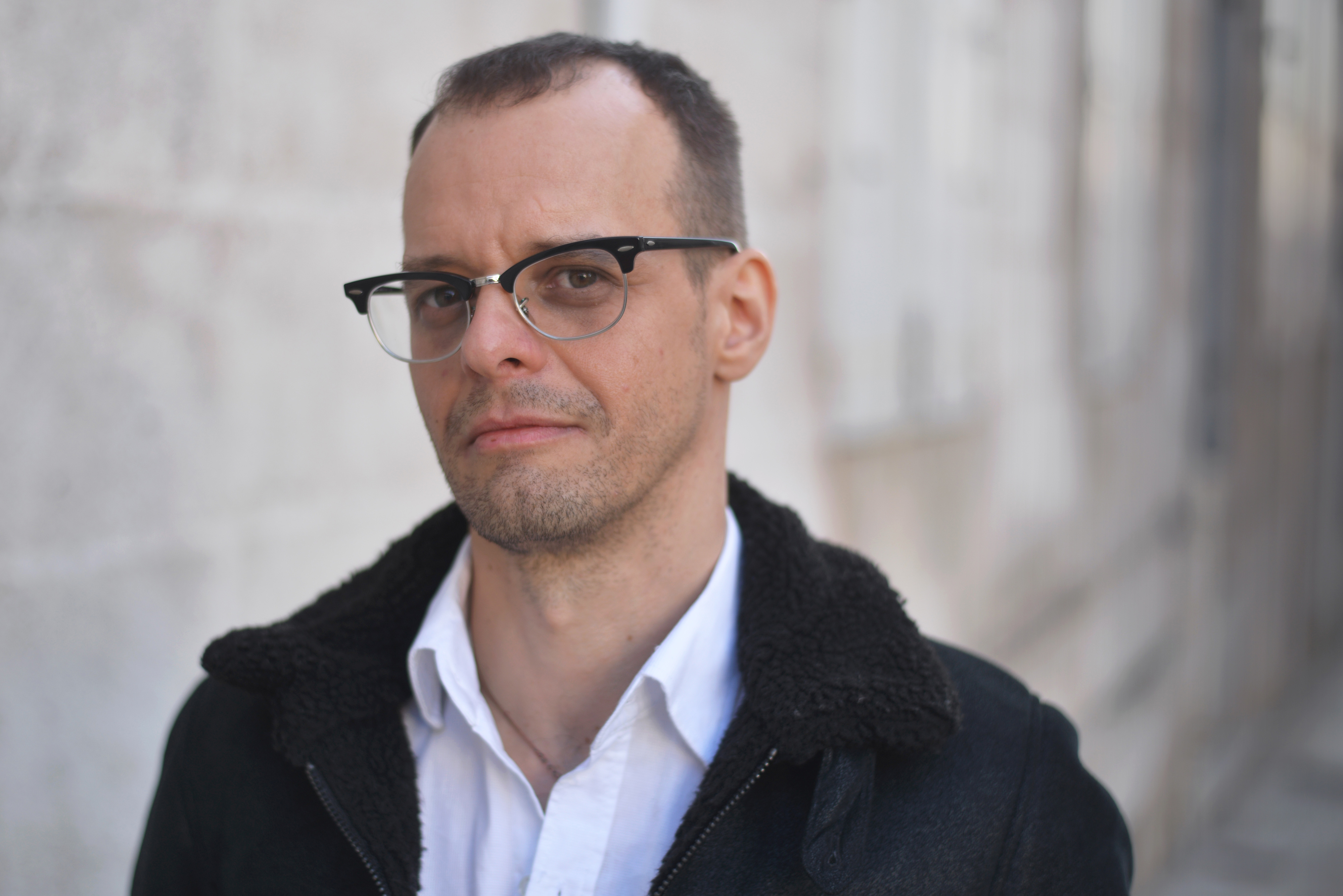 Marcello Quintanilha au Festival International de la Bande Dessinée d'Angoulême 2016.